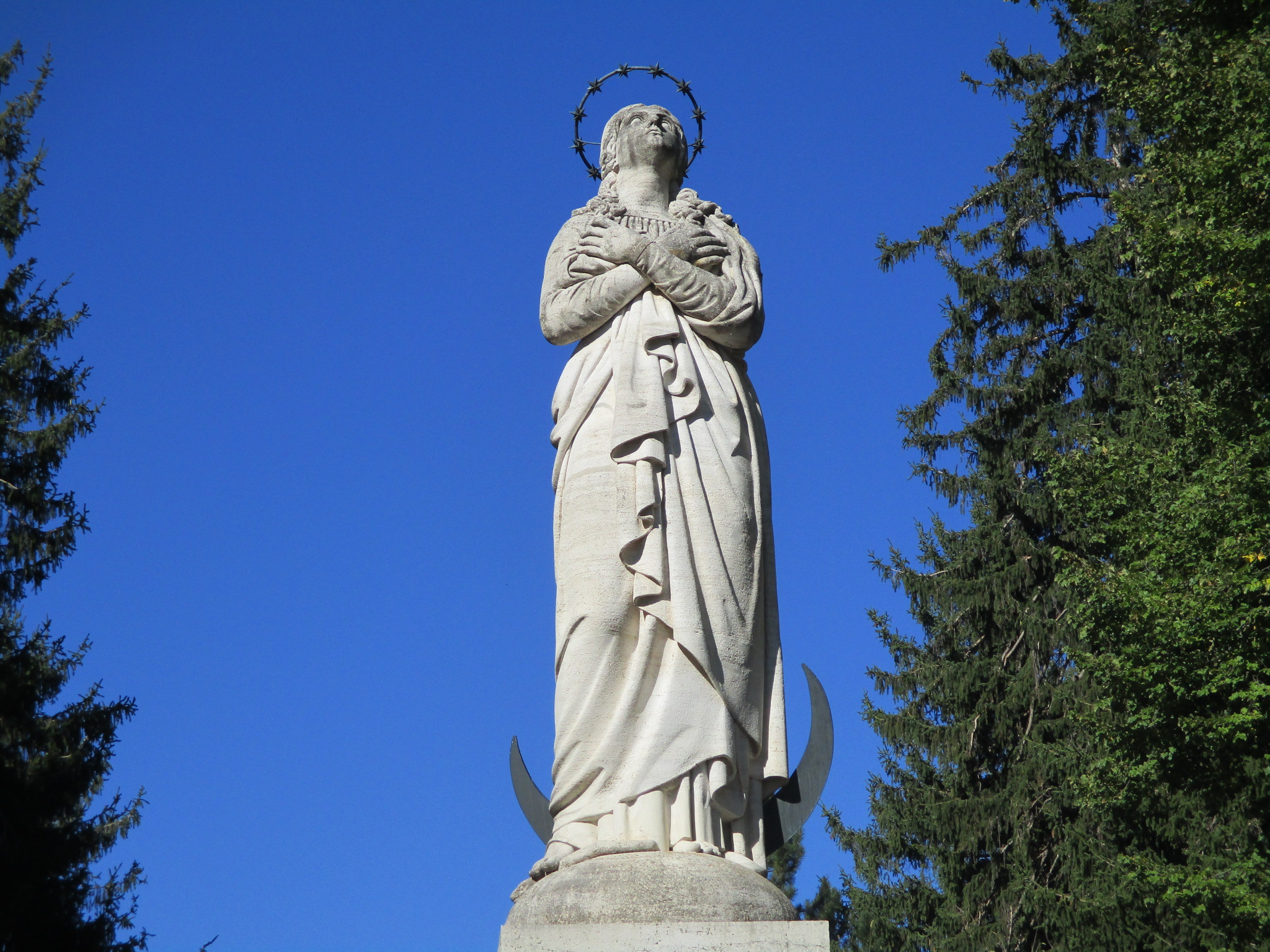 Statua dell'Immacolata Concezione di Maria